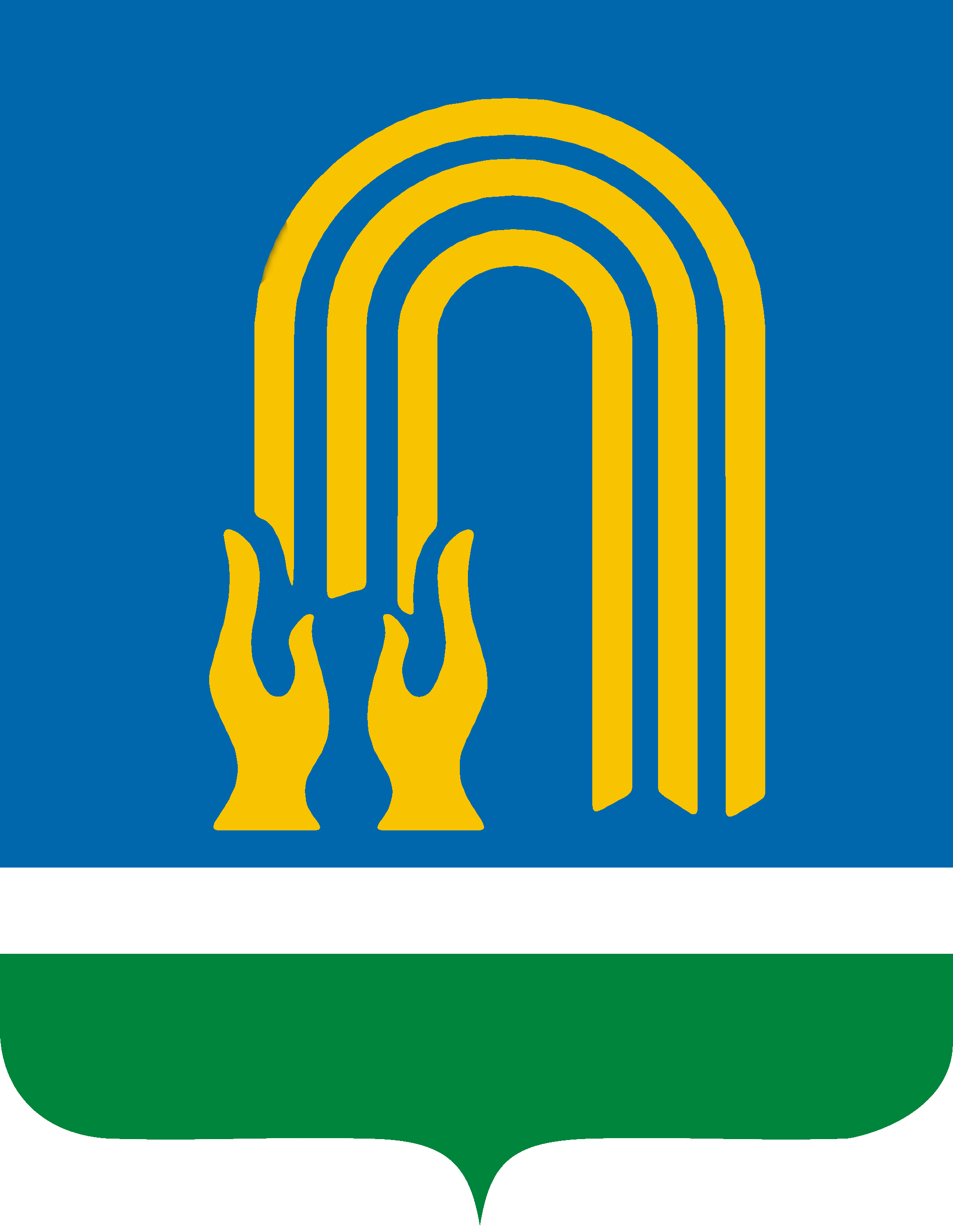 Октябрьский (Башкортостан), герб Башҡортса: Октябрьский (Башҡортостан), гербы